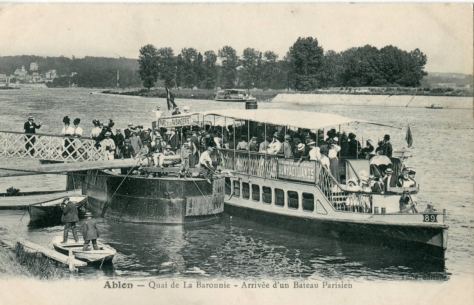 Carte postale ancienne éditée par Tulle :ABLON - Quai de la Baronnie - Arrivée d'un Bateau Parisien